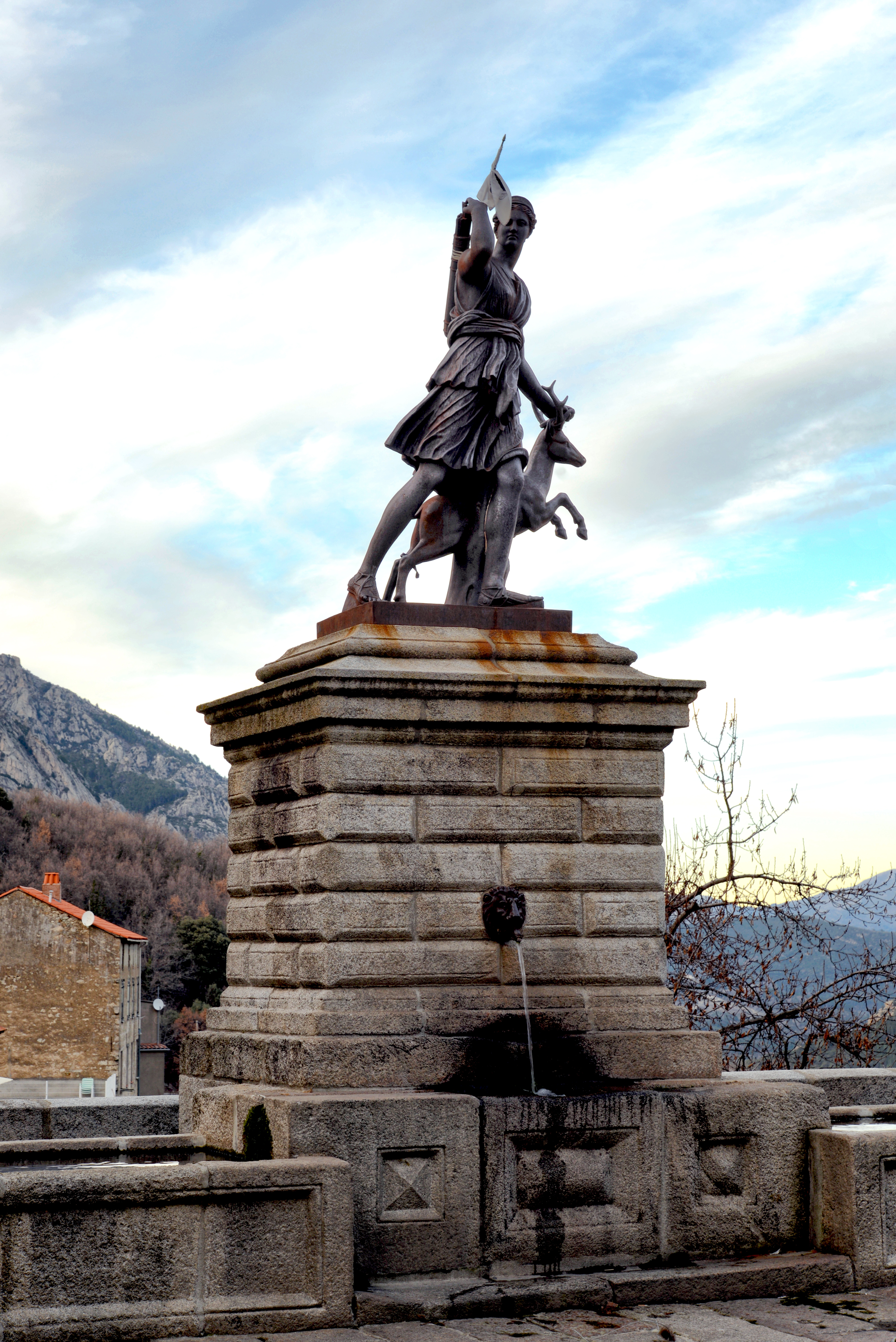 Vivario, Centre Corse (Haute-Corse) - La fontaine de Diana à la biche au centre du village